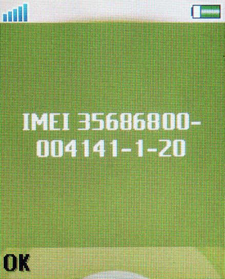 IMEI-Anzeige eines Handys